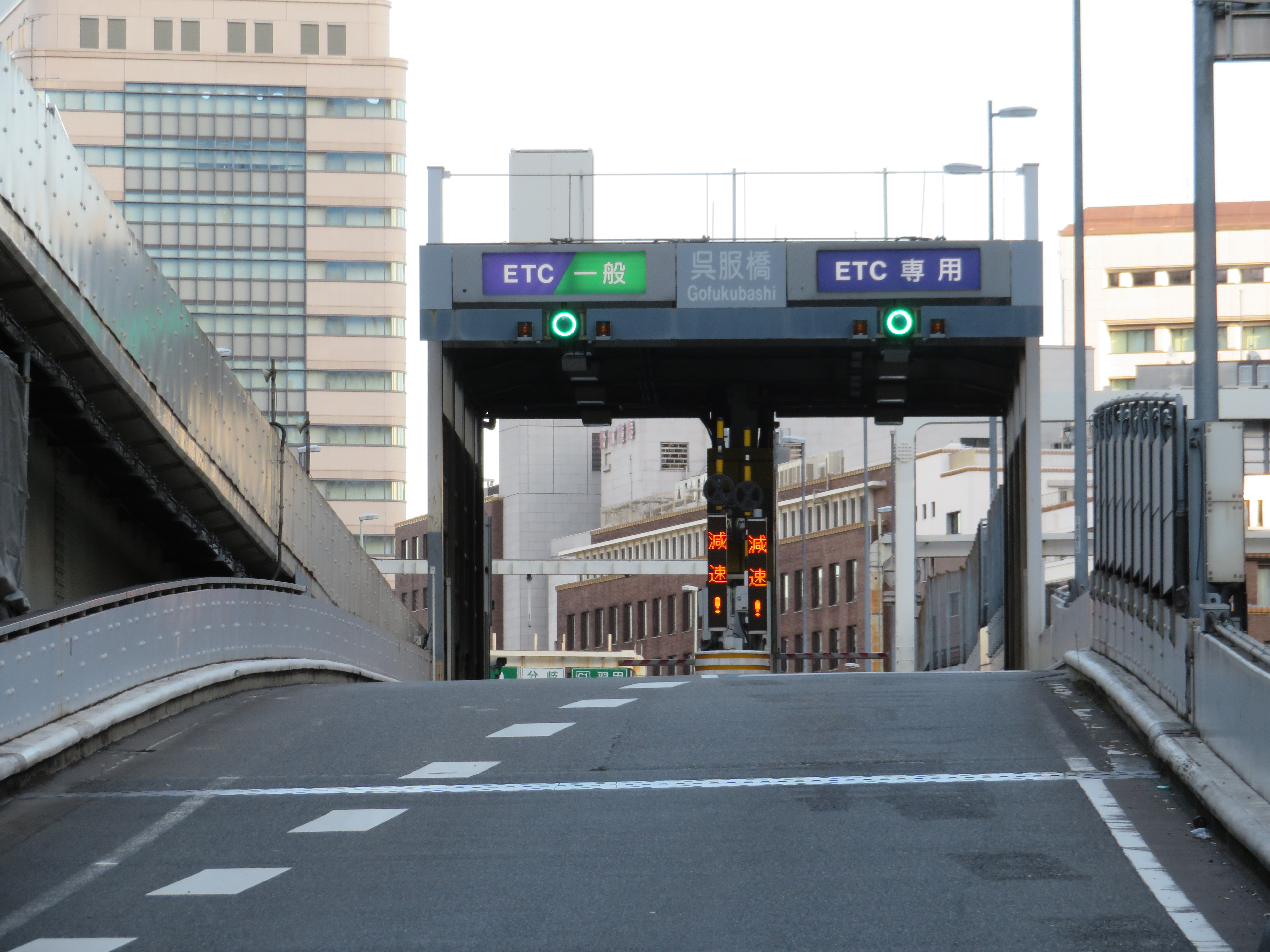 首都高速道路都心環状線呉服橋入口料金所